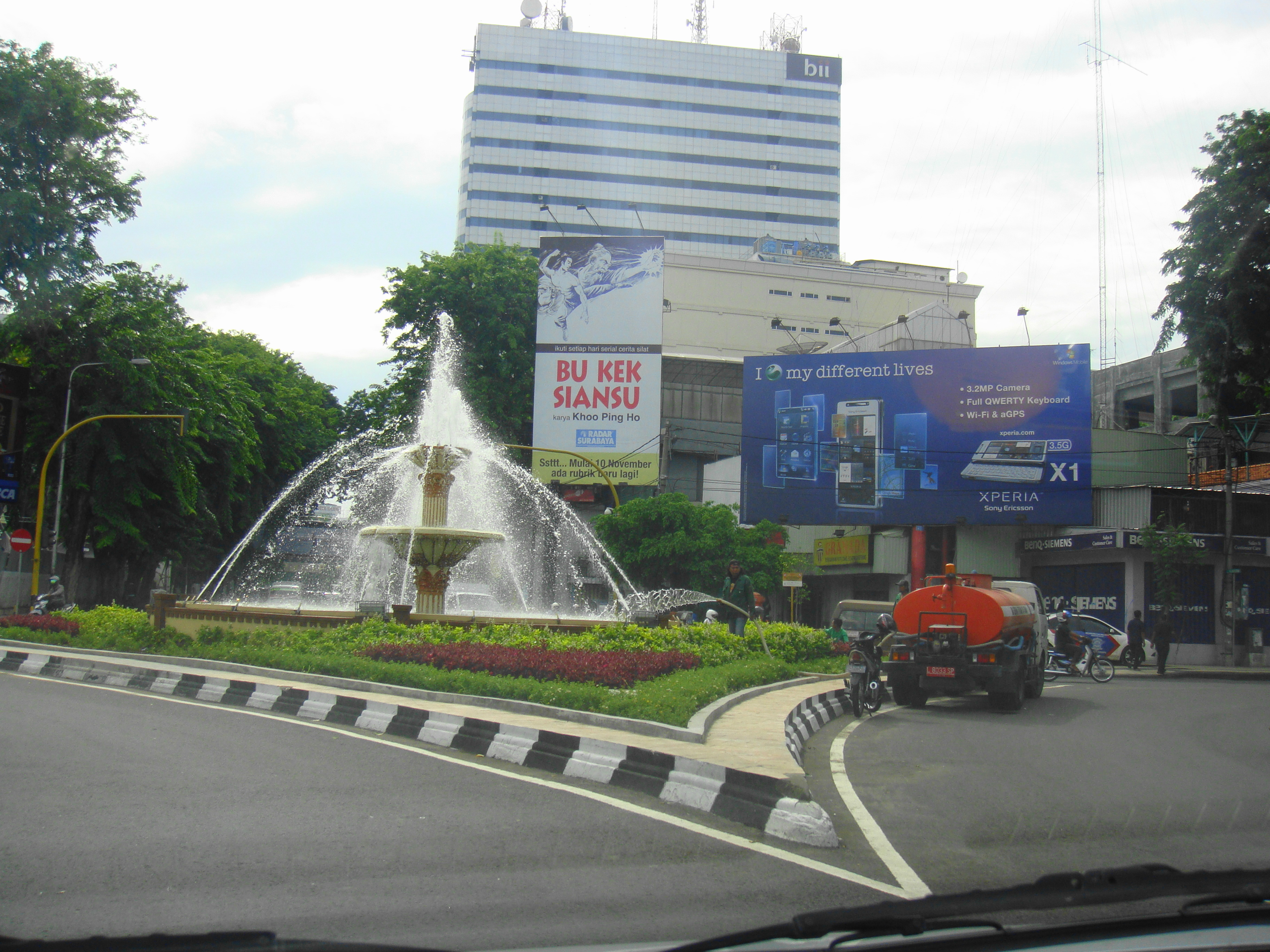 BII & Air Mancur Perempatan Gubeng